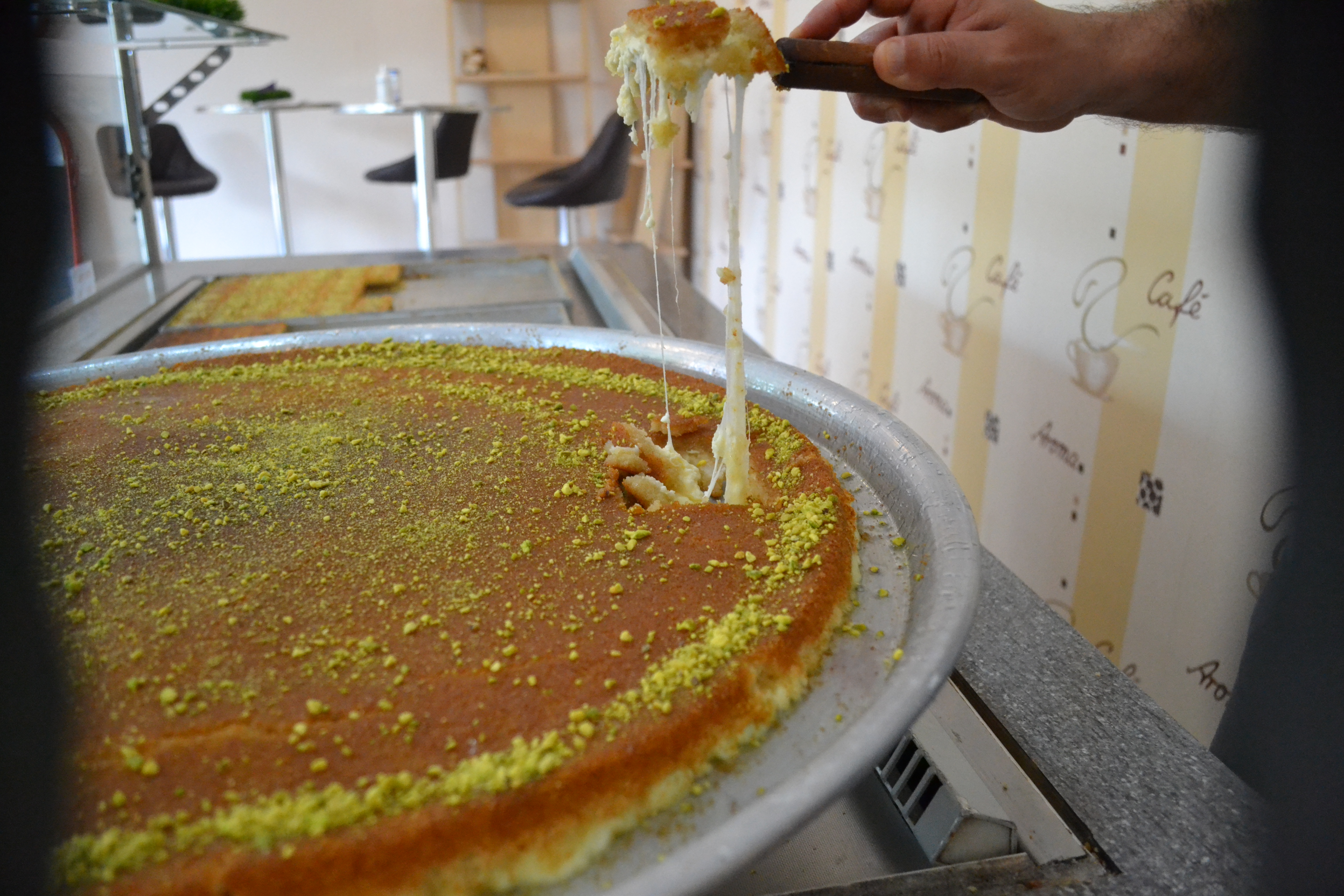 Kunafa